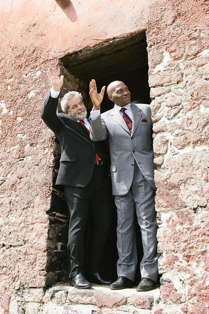 Ilha de Gorée, Senegal - Presidente Lula e o presidente do Senegal, Addoulaye Wade, na chegada à Iha de Gorée. Foto: Ricardo Stuckert/PR